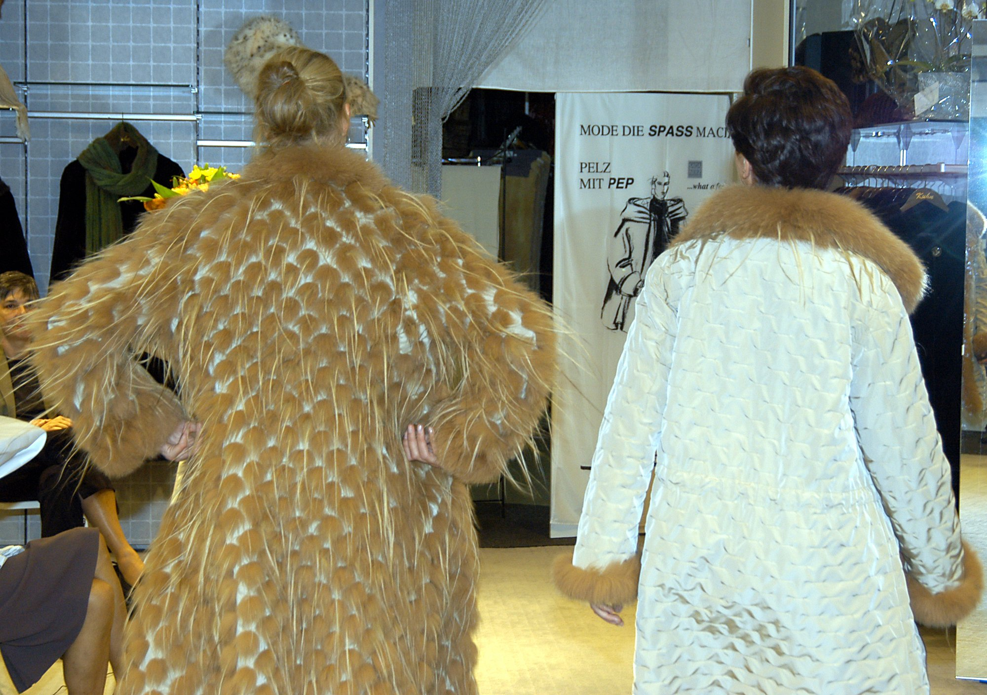 Modenschau der Firma Pelzmodelle Kuhn, Düsseldorf. Anlässlich des hundertjährigen Firmenjubiläums. Microfasermäntel mit aufgenähten Patches aus Fuchs und Ziegenfell, reversibel (Design Rosenberg & Lenhart, Frankfurt am Main).